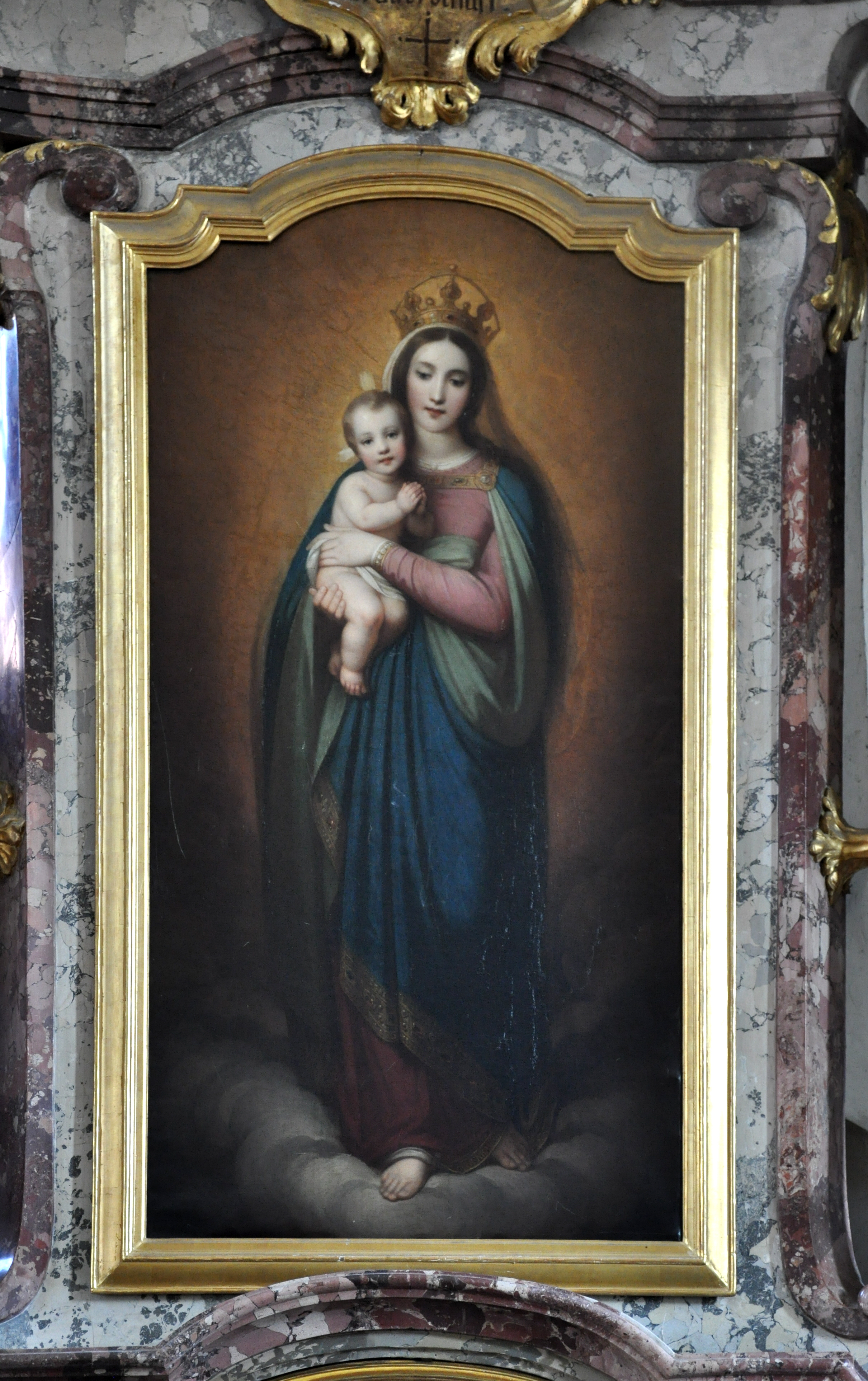 Wangen im Allgäu, Kath. Pfarrkirche St. Martinus Rechter Seitenaltar, Altarblatt "Madonna mit Kind" von Joseph Anton von Gegenbaur, 19. Jh.